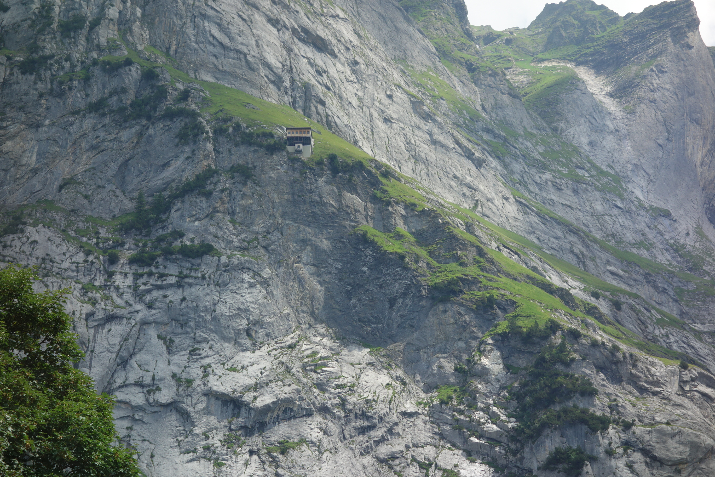 Wetterhorn Aufzug, Grindelwald BE, Schweiz